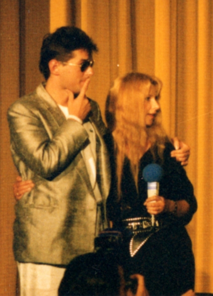 Falco und Ursela Monn, 1986 bei der Filmpremiere Geld oder Leber in Essen